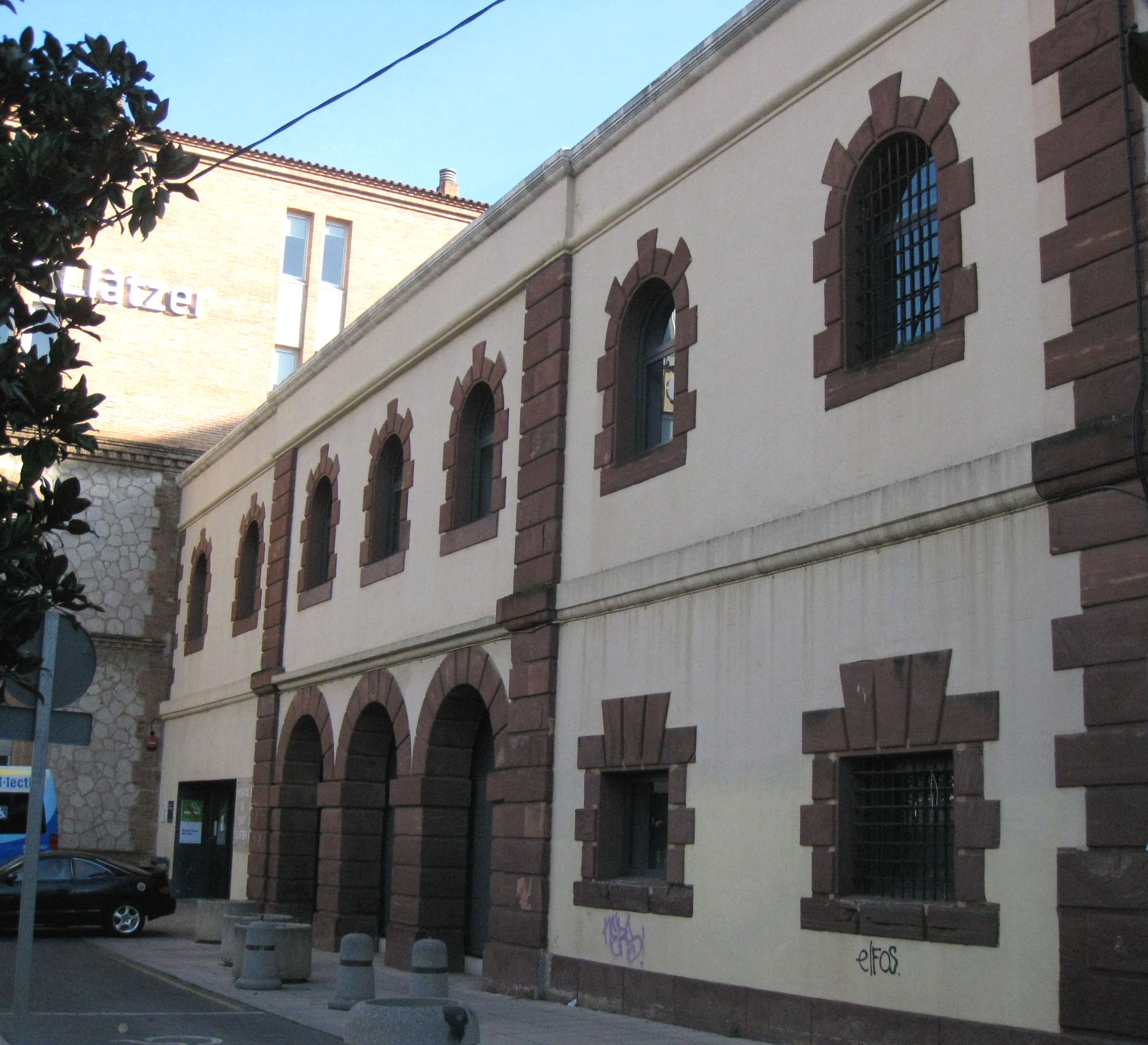 Hospital de Sant Llàtzer, conjunt d'edificis entorn de la plaça del Doctor Robert, que pel darrere dóna al torrent de Vallparadís (Terrassa). Es tracta d'un complex construït al segle XVII i modificat al segle XX, que inclou el claustre de l'antic convent de Sant Francesc, decorat amb plafons ceràmics sobre la vida del sant, i la Clínica del Remei, edifici neogòtic de Lluís Muncunill del 1907. A la fotografia, vista de la part del conjunt que es va fer servir antigament com a dipòsit carcerari.